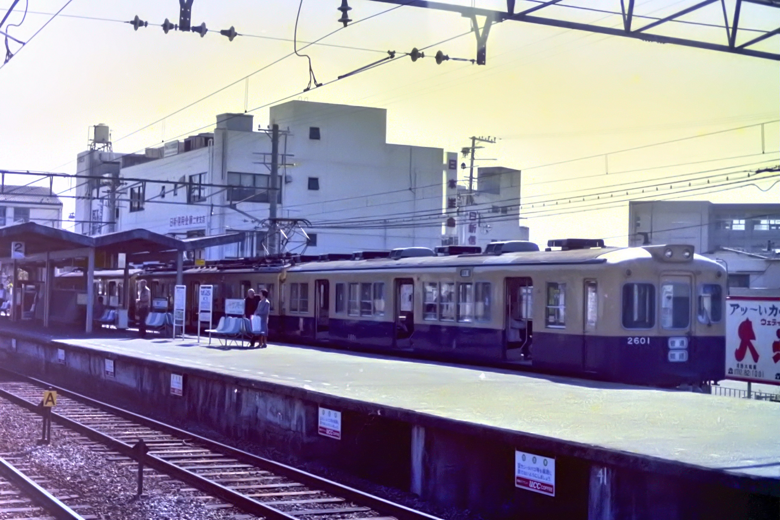 山陽電気鉄道2300系 1985年東二見駅